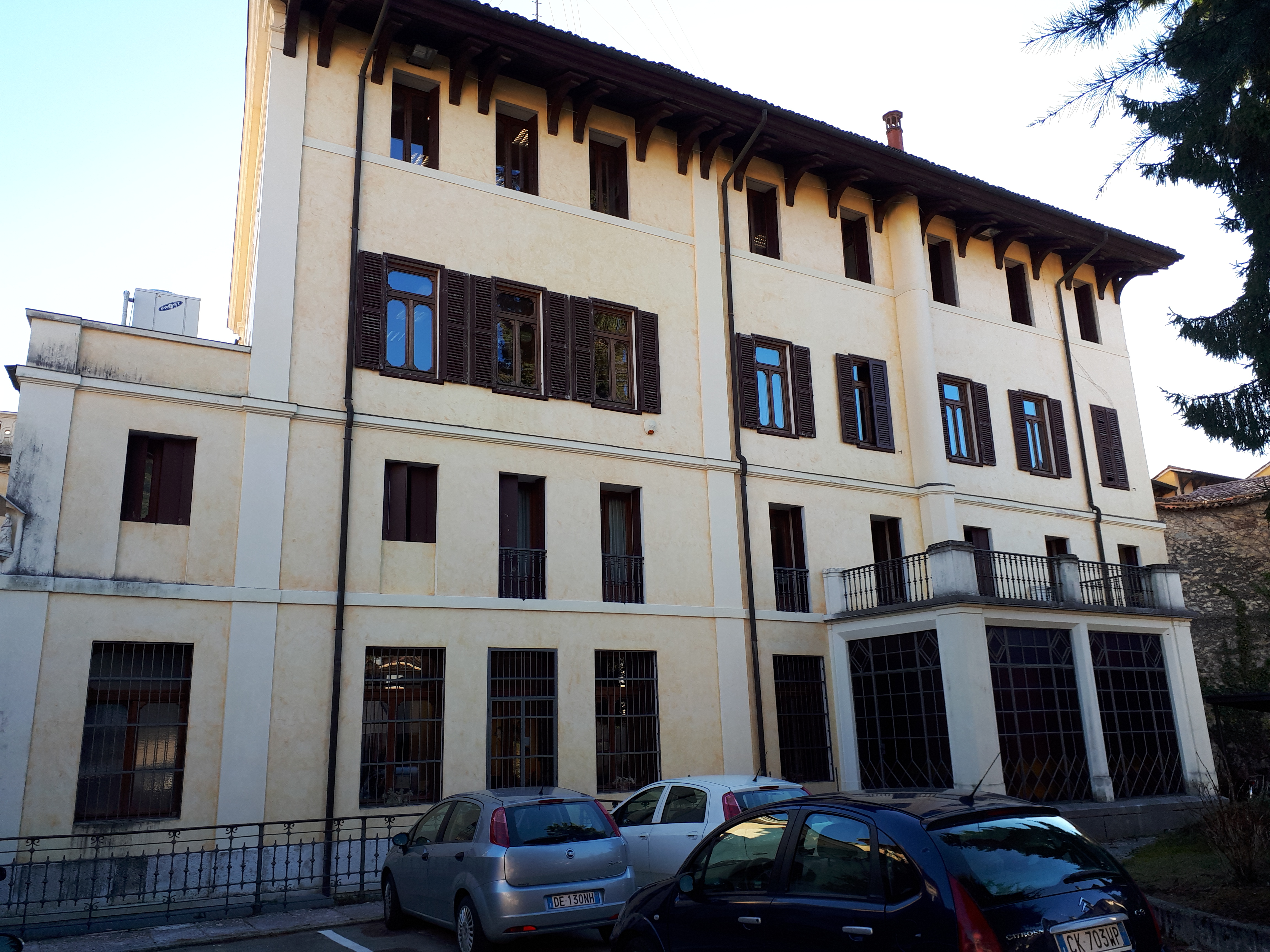 Facciata posteriore di palazzo Maraschin di Schio